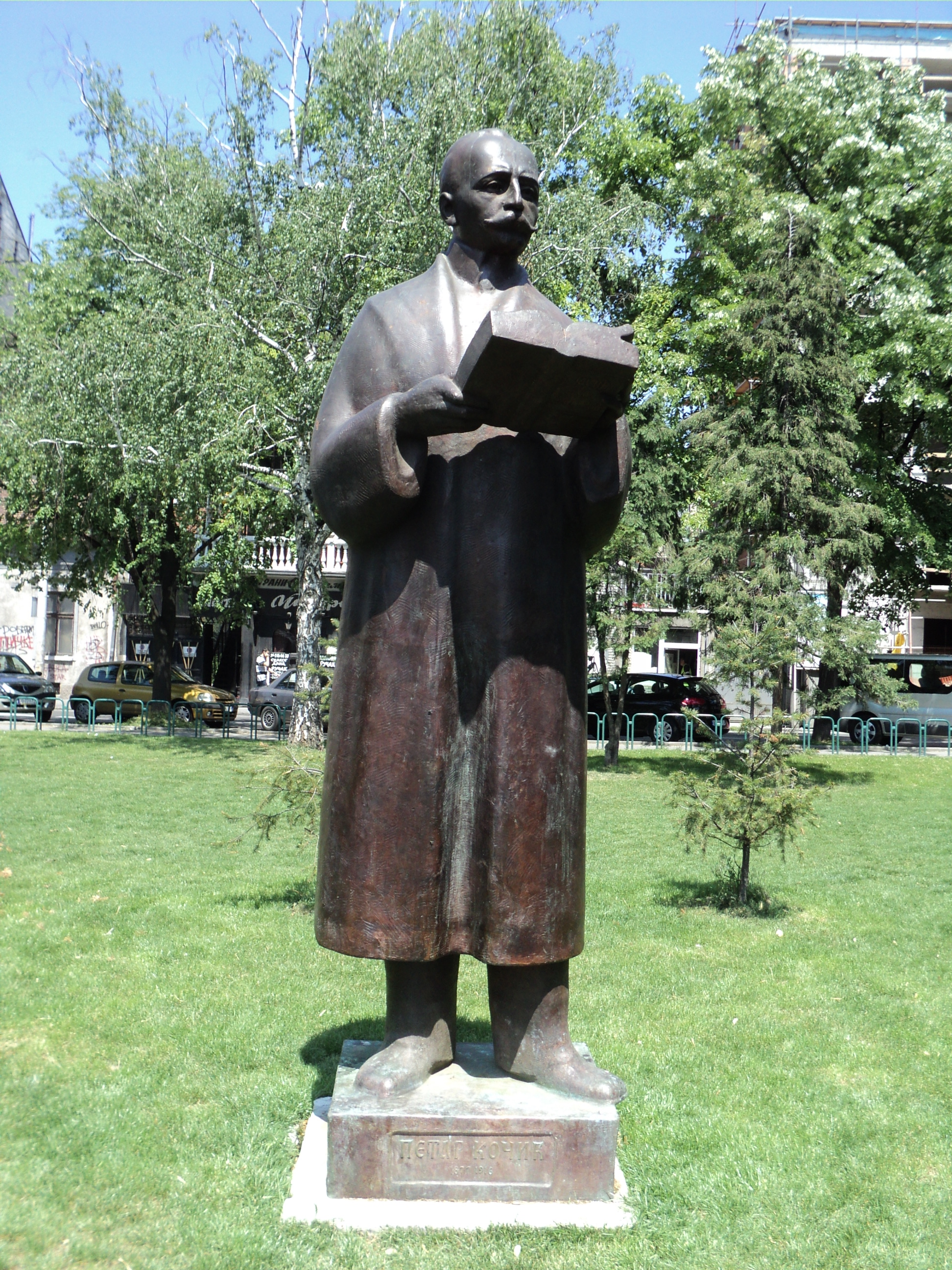 Statua Petra Kočića u Beogradu. Self-made. Maj 2011.